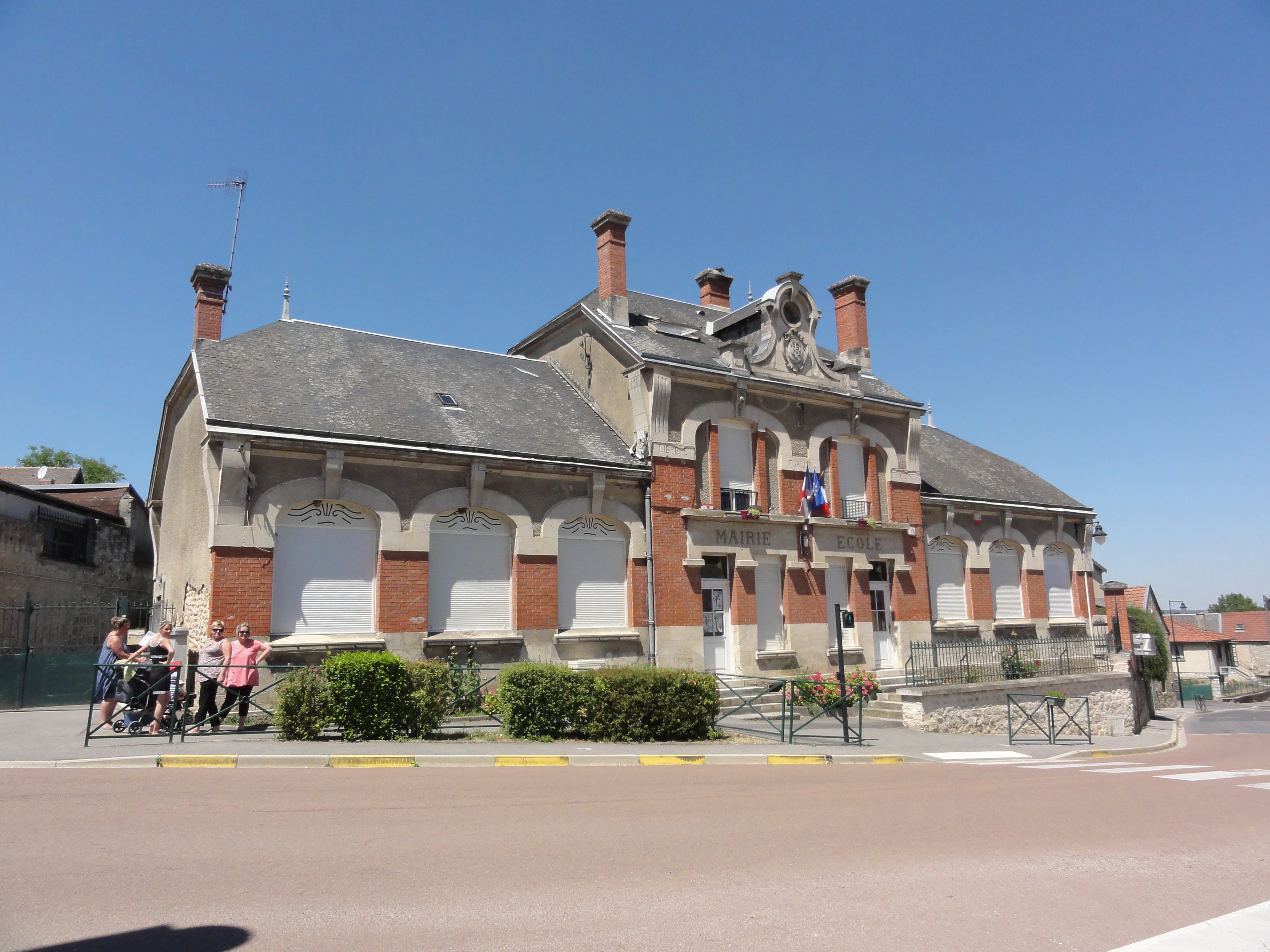 Longueval-Barbonval (Aisne) mairie